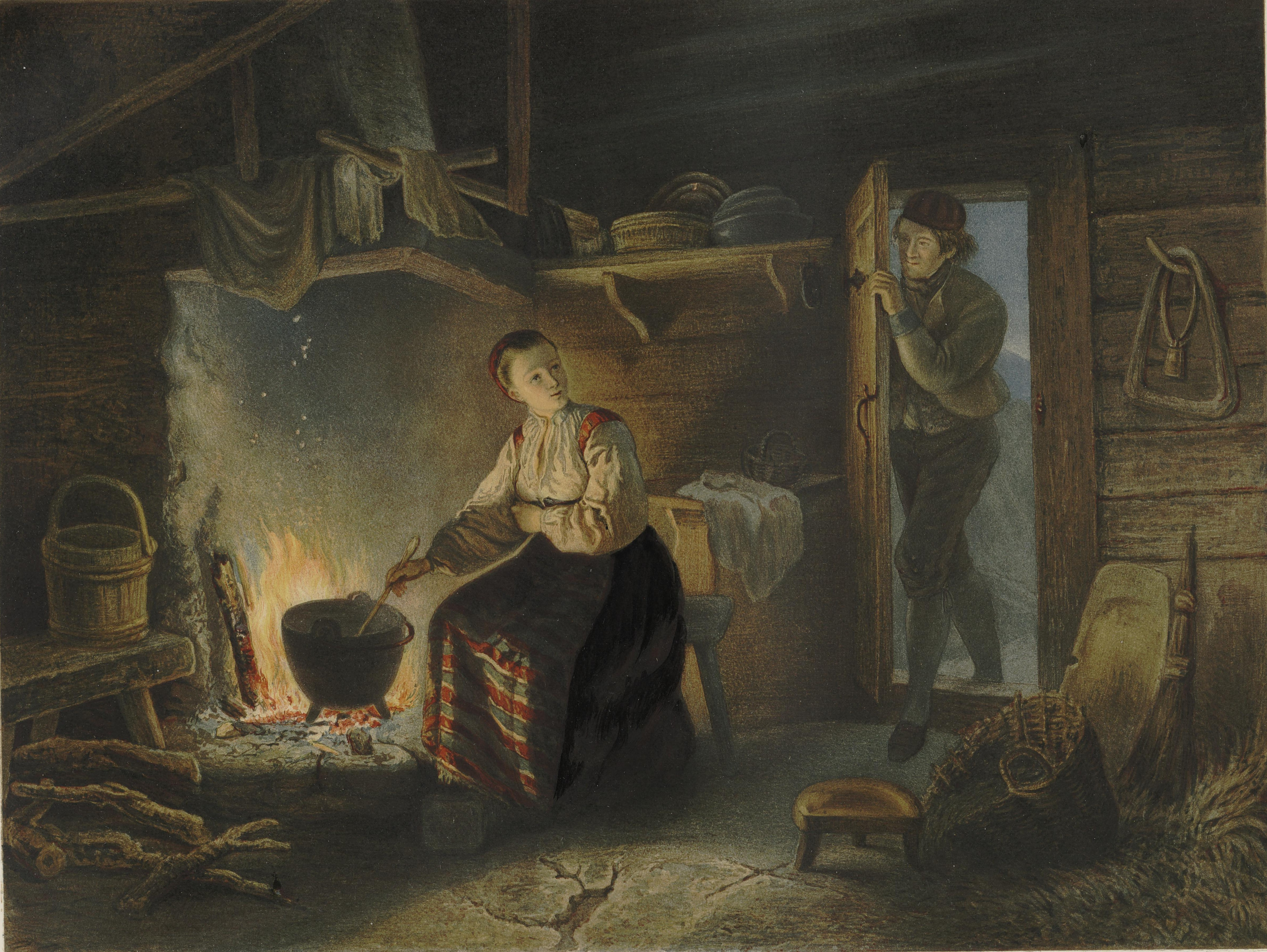 Illustrasjon hentet fra boken Norske Folkelivsbilleder av Tidemand, Adolph og utgitt av Chr. Tønsberg (Christiania, 1854)